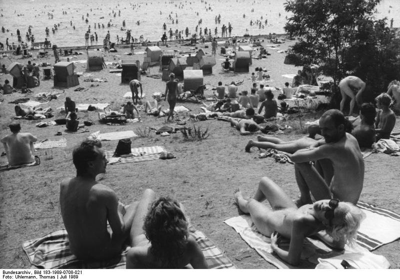 ADN-ZB/ Uhlmann / 8.7.1989 / Berlin: Strandfest / Zum bunten Fest im Strandbad Müggelsee zog es fast 7000 Sonnen- und Badelustige - meist ohne "warme Sachen".